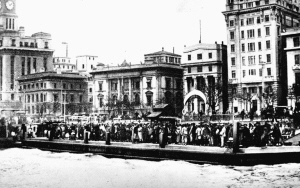 中文（中国大陆）: 1920年代的铜人码头